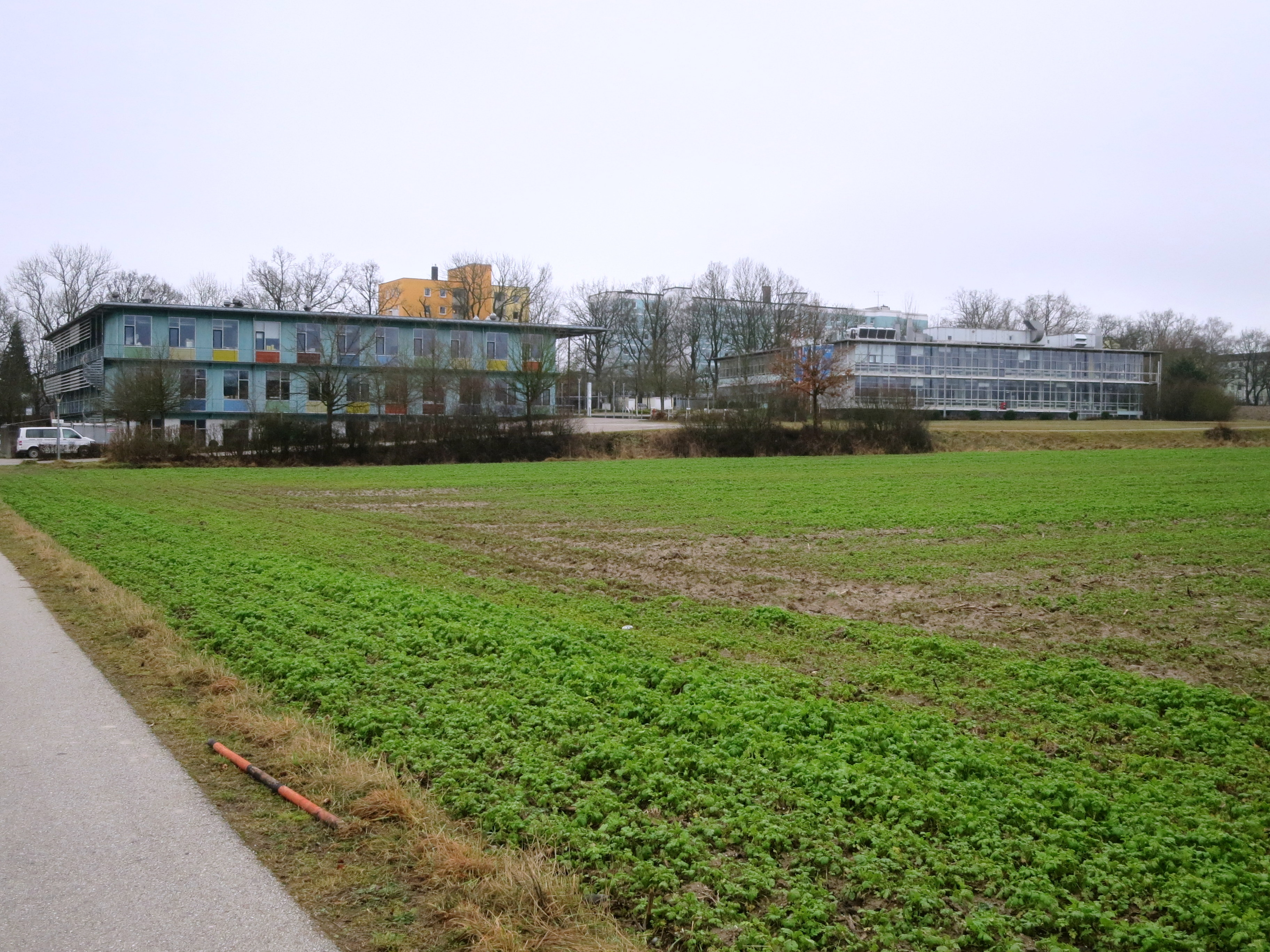 Lebensmittelchemie-Zentrum, Lise-Meitner-Str. 4, Freising